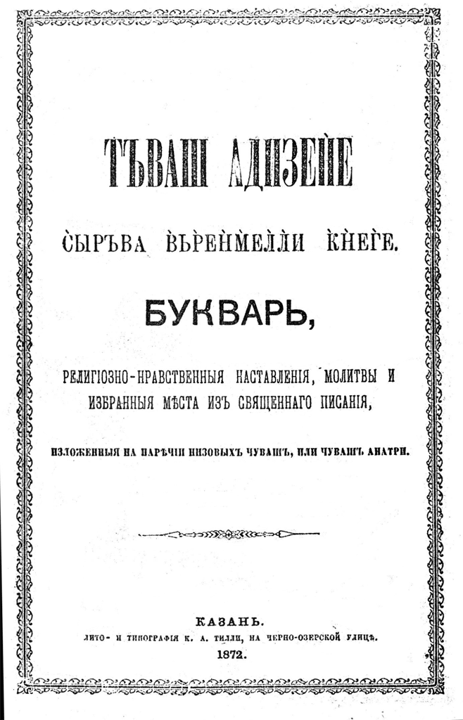 Обложка книги «Т́ъваш ад́изен̀е с̀ыръва в̀ьр̀ен̀м̀ел̀л̀и к̀н̀ег̀е»Обложка первой книги с алфавитом Яковлева «Т́ъваш ад́изен̀е с̀ыръва в̀ьр̀ен̀м̀ел̀л̀и к̀н̀ег̀е».